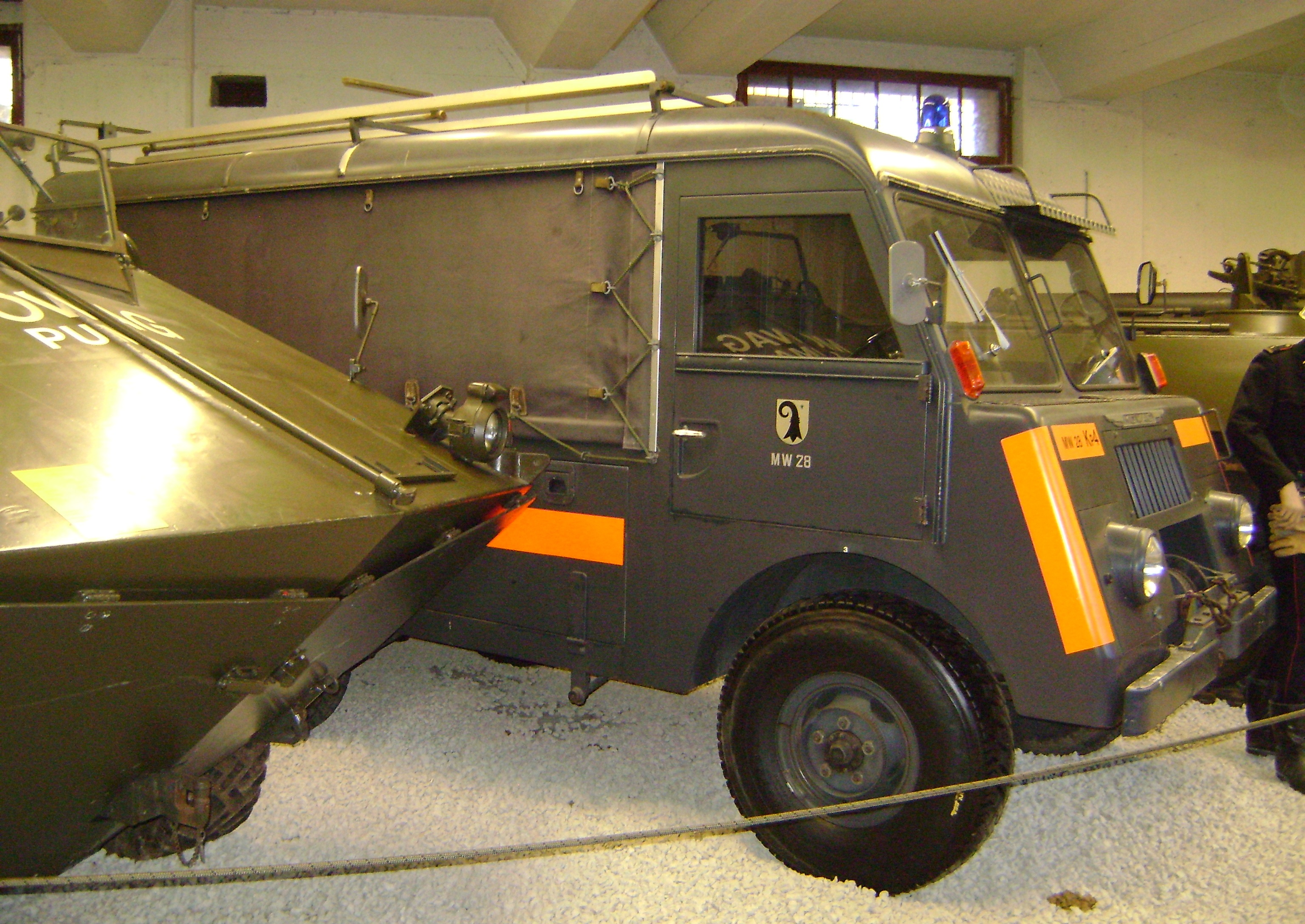 MOWAG T1 4x4 seite